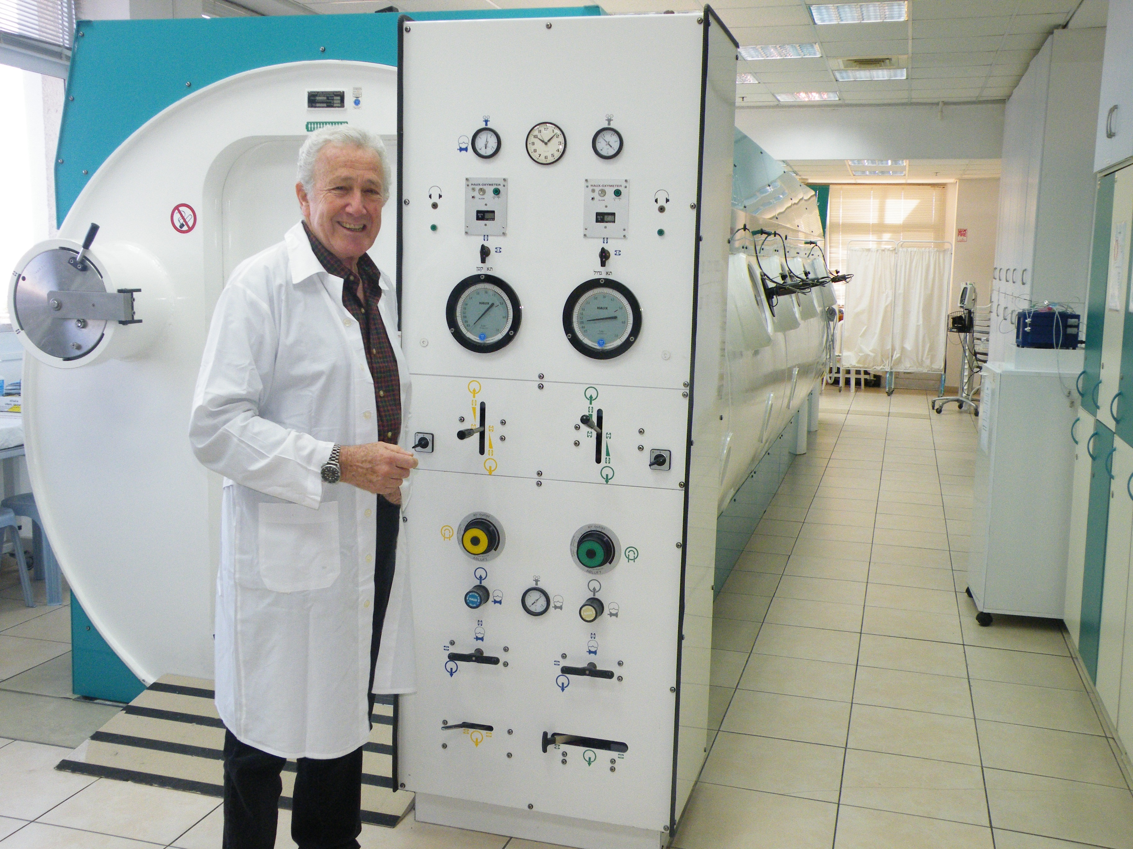 תא לחץ לטיפול היפרברי בבית חולים אלישע